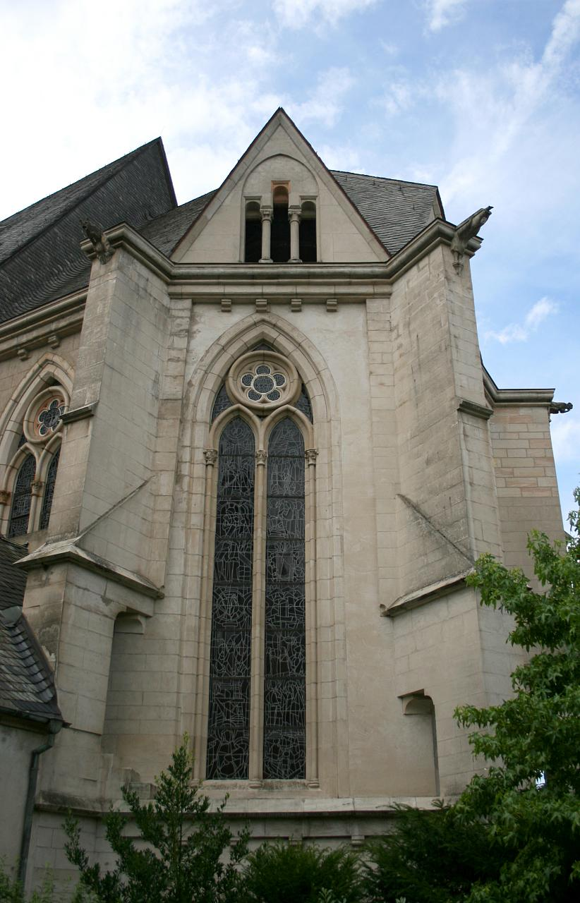 Wetzlarer Dom